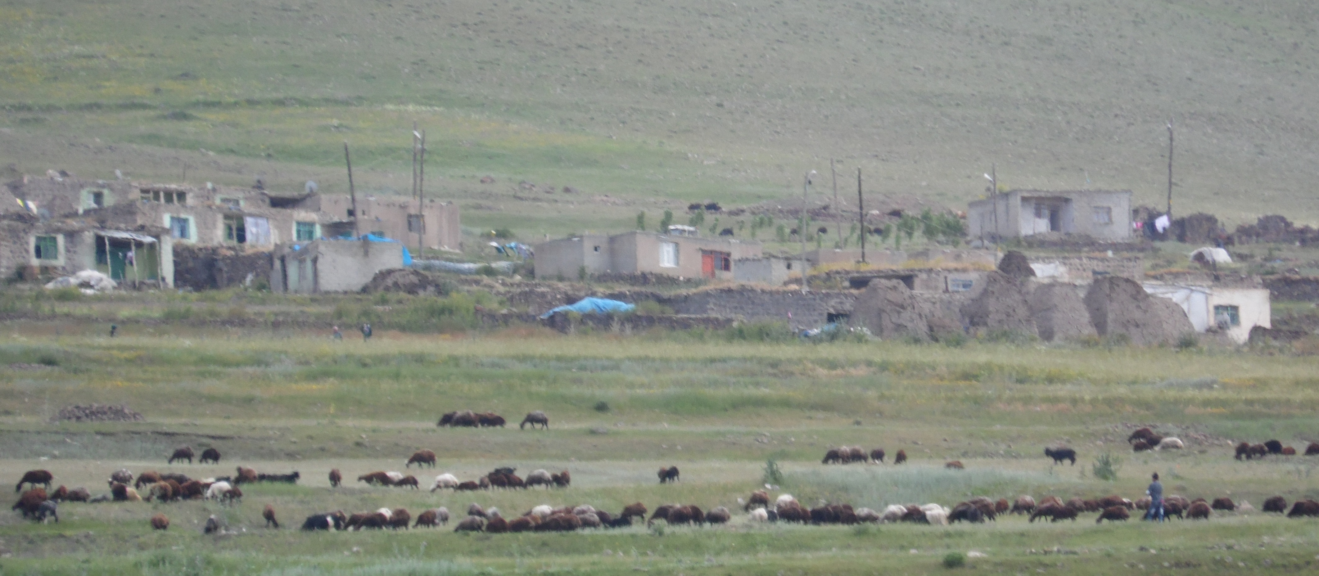 nişankaya köyü koyunlar